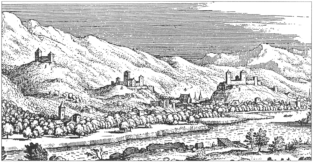 Historische Ansicht von Bellinzona 1654 (Ausschnitt)